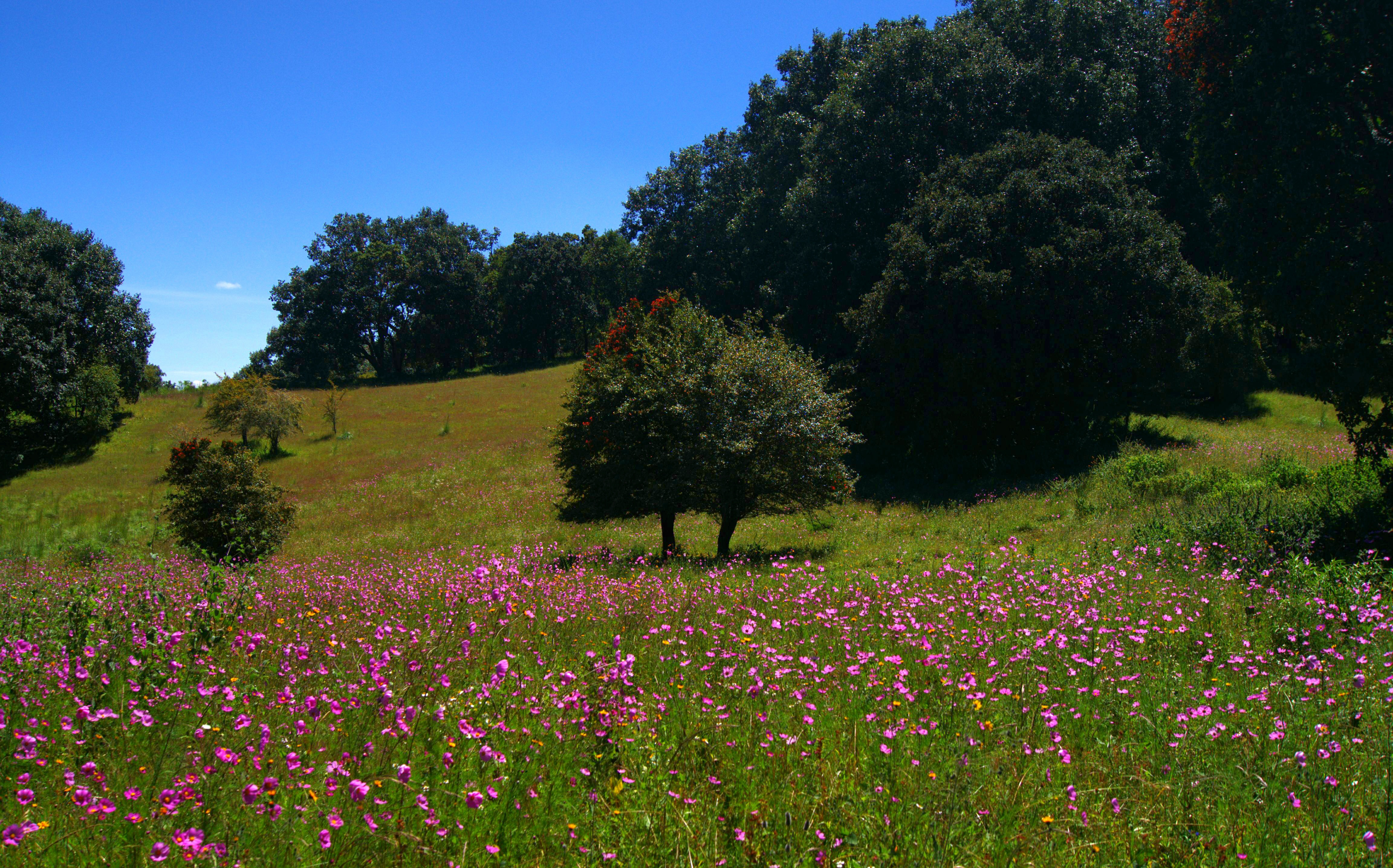 Área natural protegida los Amoles